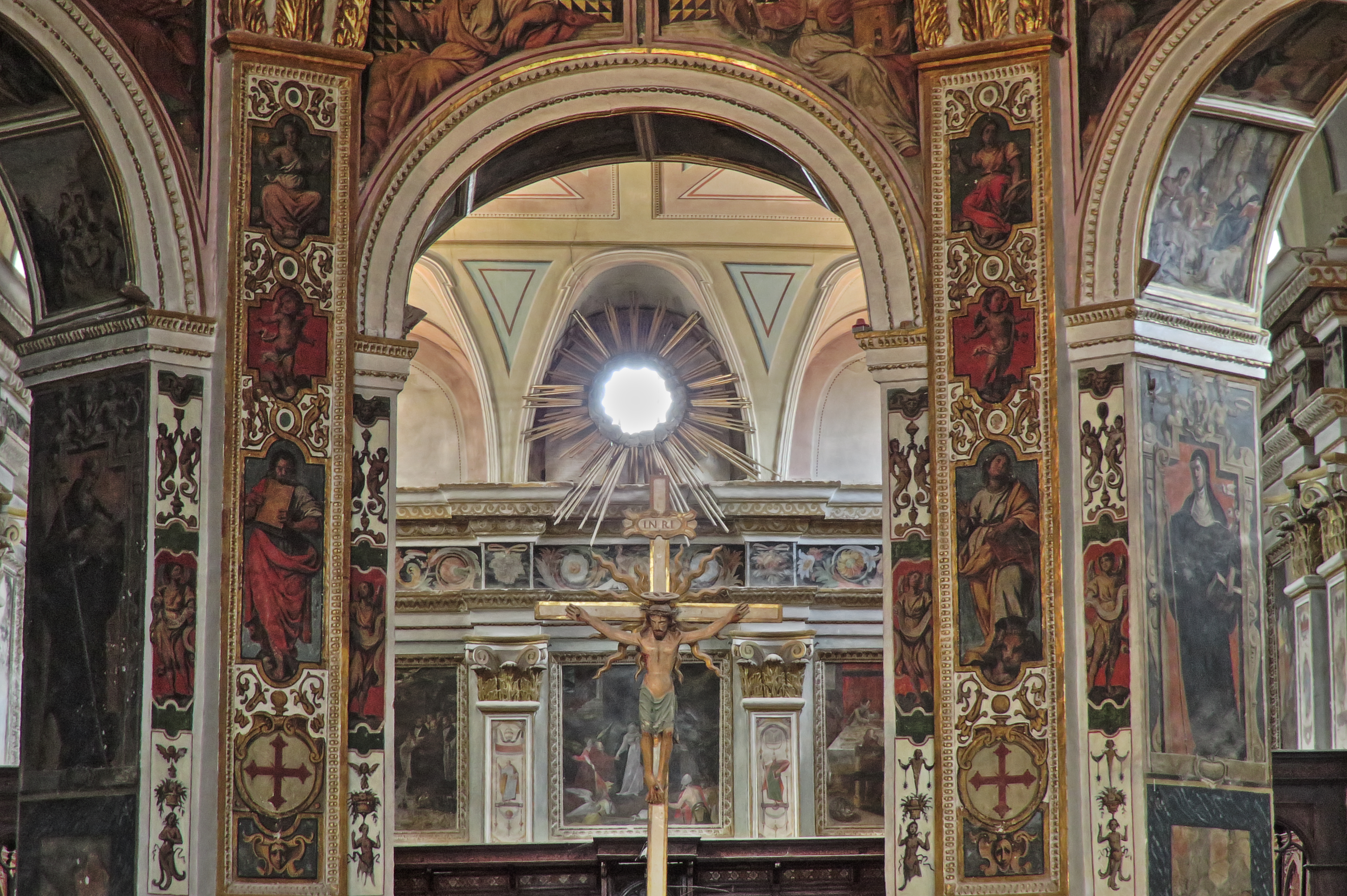 Interno